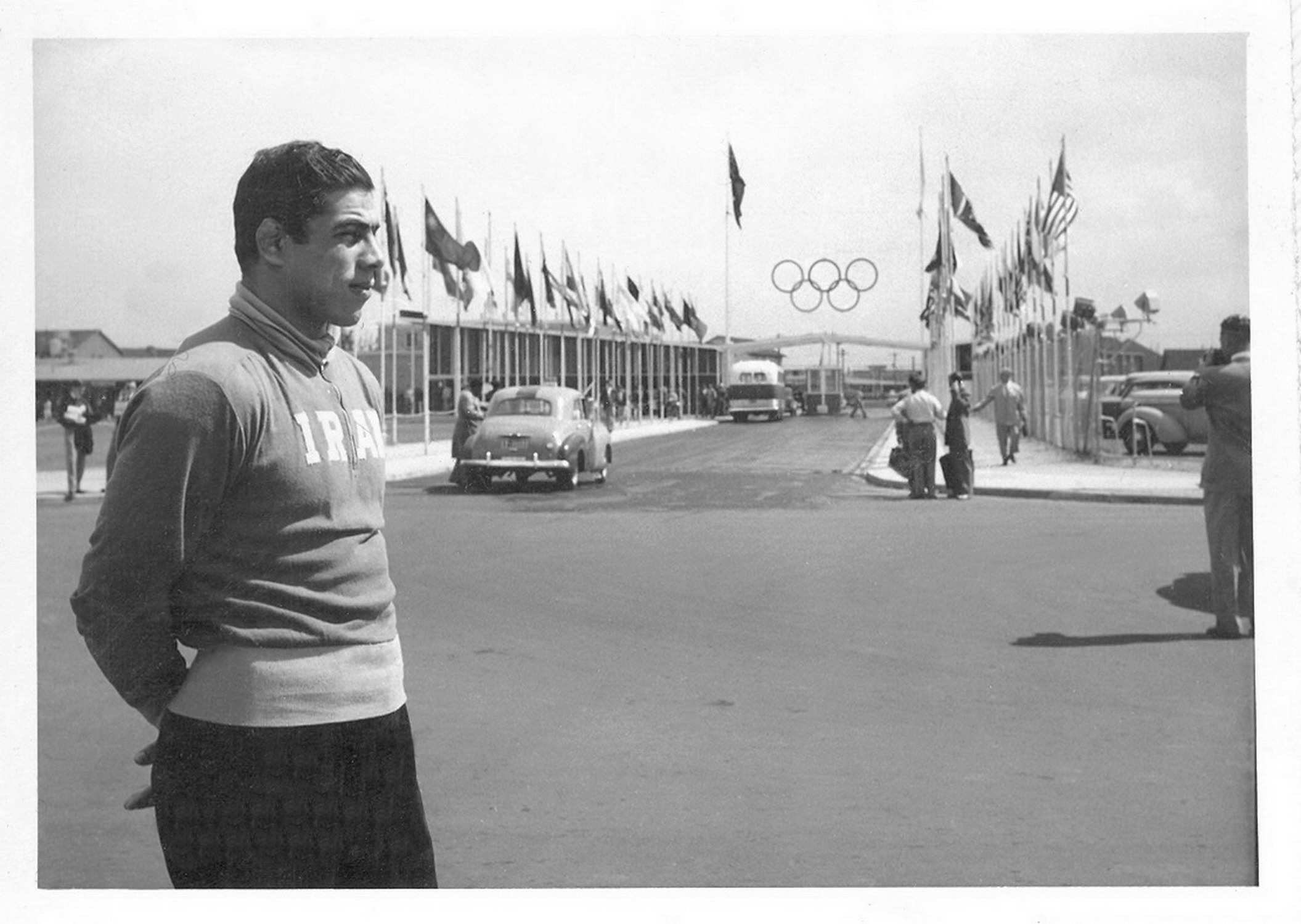 غلامرضا تختی Jahan Phalavan Takhti Olympic Gold Winner (1956), World Wrestling Champion (1959 and 61), and winner of Pahlavani Armlet in 1957, 58 and 59 practising with a pair of light-weight Meels